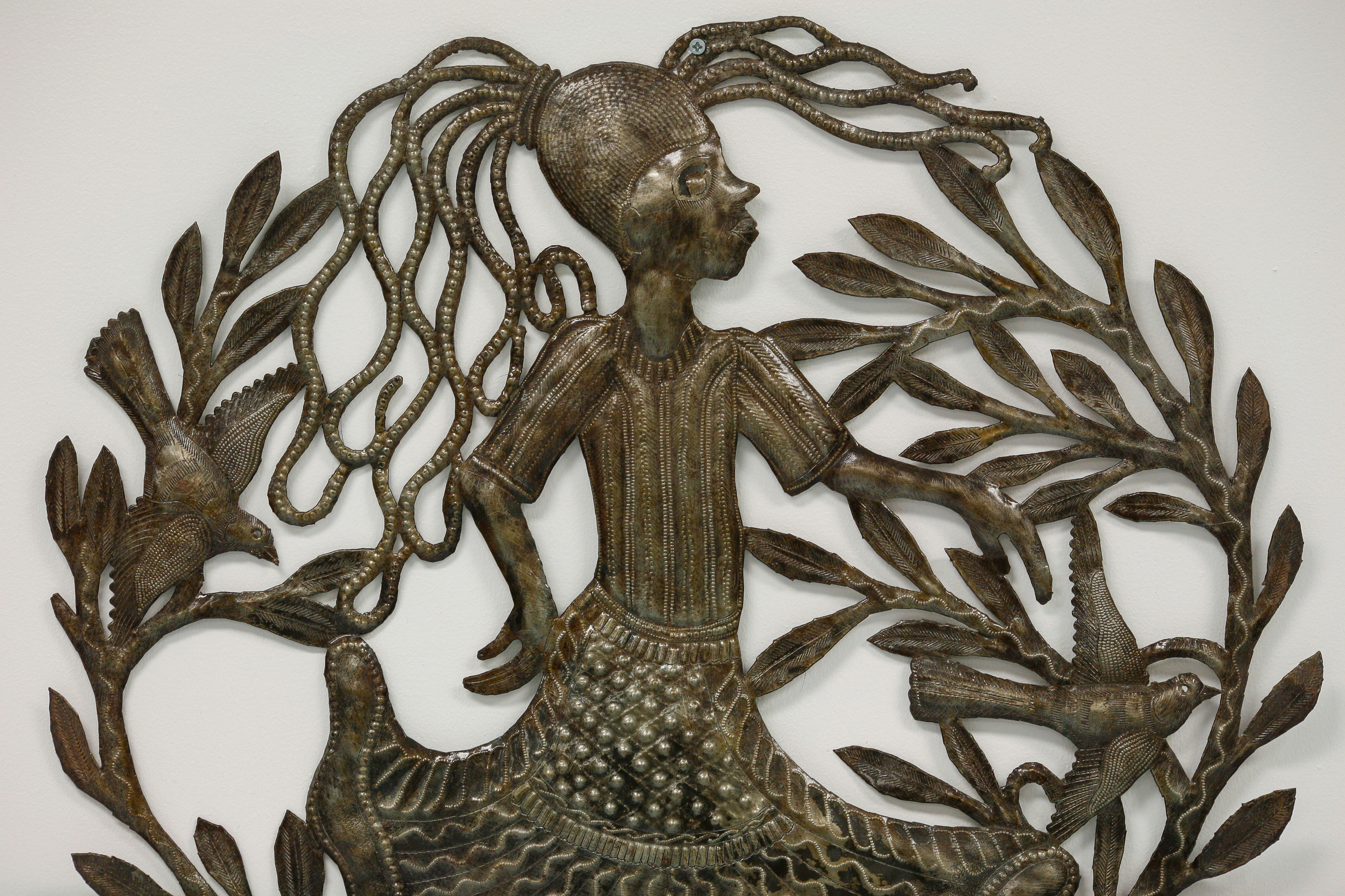 Haitian Metal Art